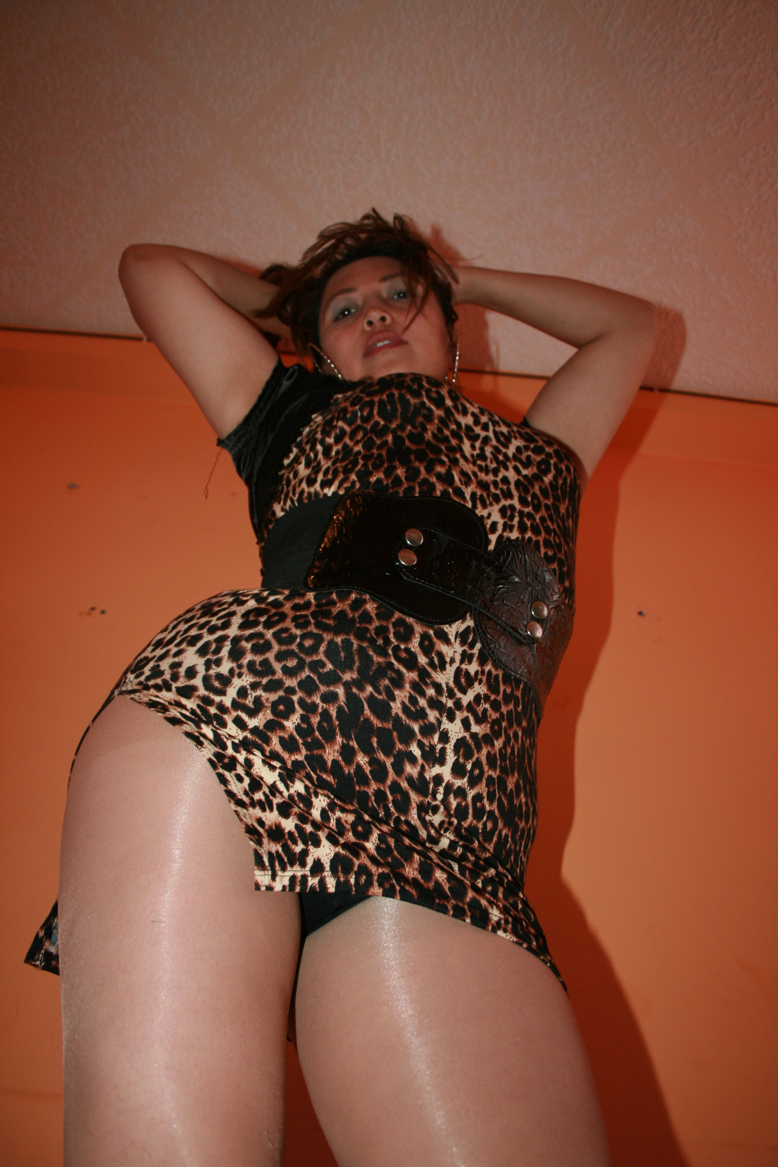 Canta-autora Ecuatoriana nacido en Guasuntos